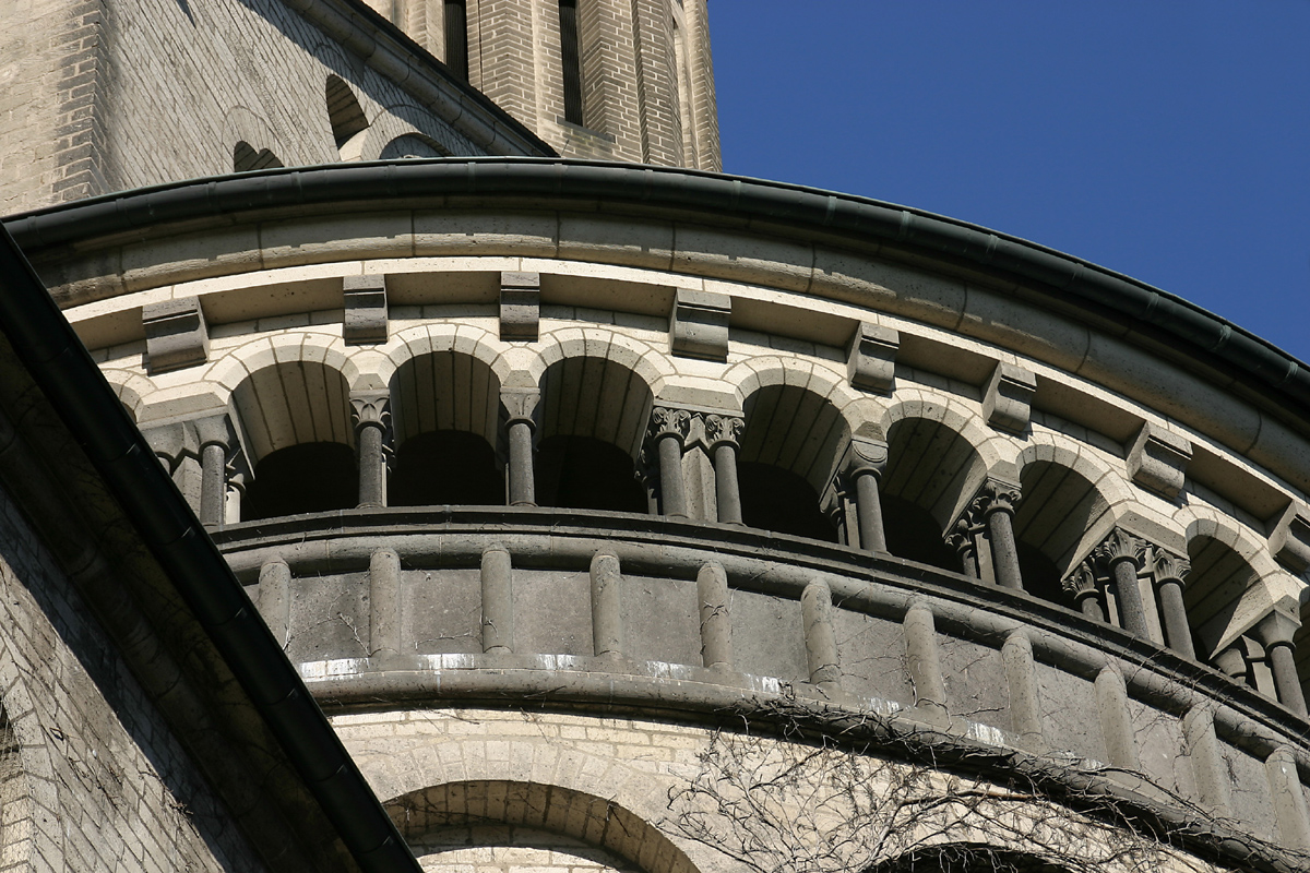 Groß St. Martin, Köln, Zwerggalerie an der Südkonche